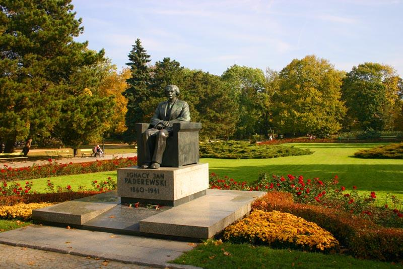 Pomnik Ignacy Paderewski, Ujazdowski Park in Warsaw with the permission of the authers Marek and Ewa Wojciechowscy [1]